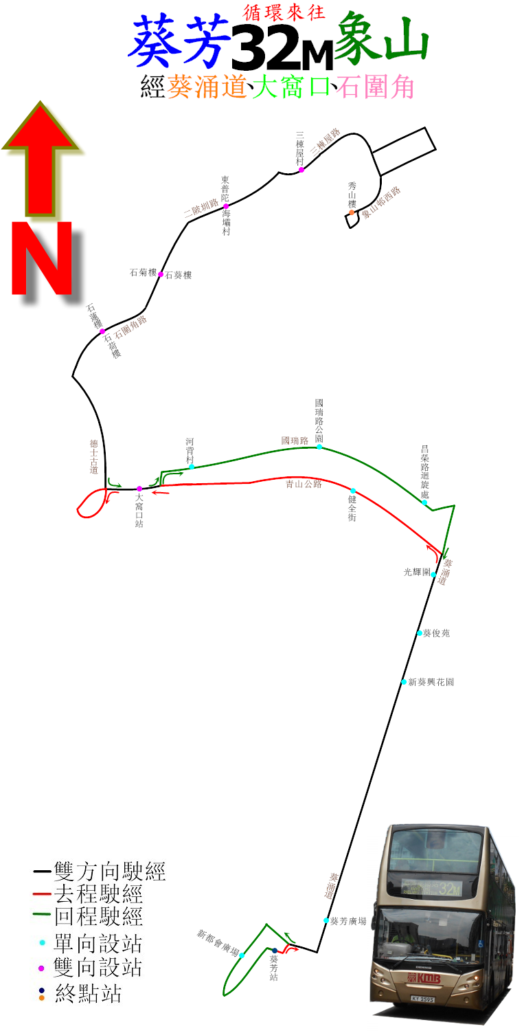 中文（香港）: 九巴32M線的走線圖